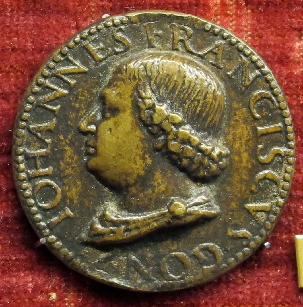 verso: Allegoria della Fortuna tra Marte e Minerva